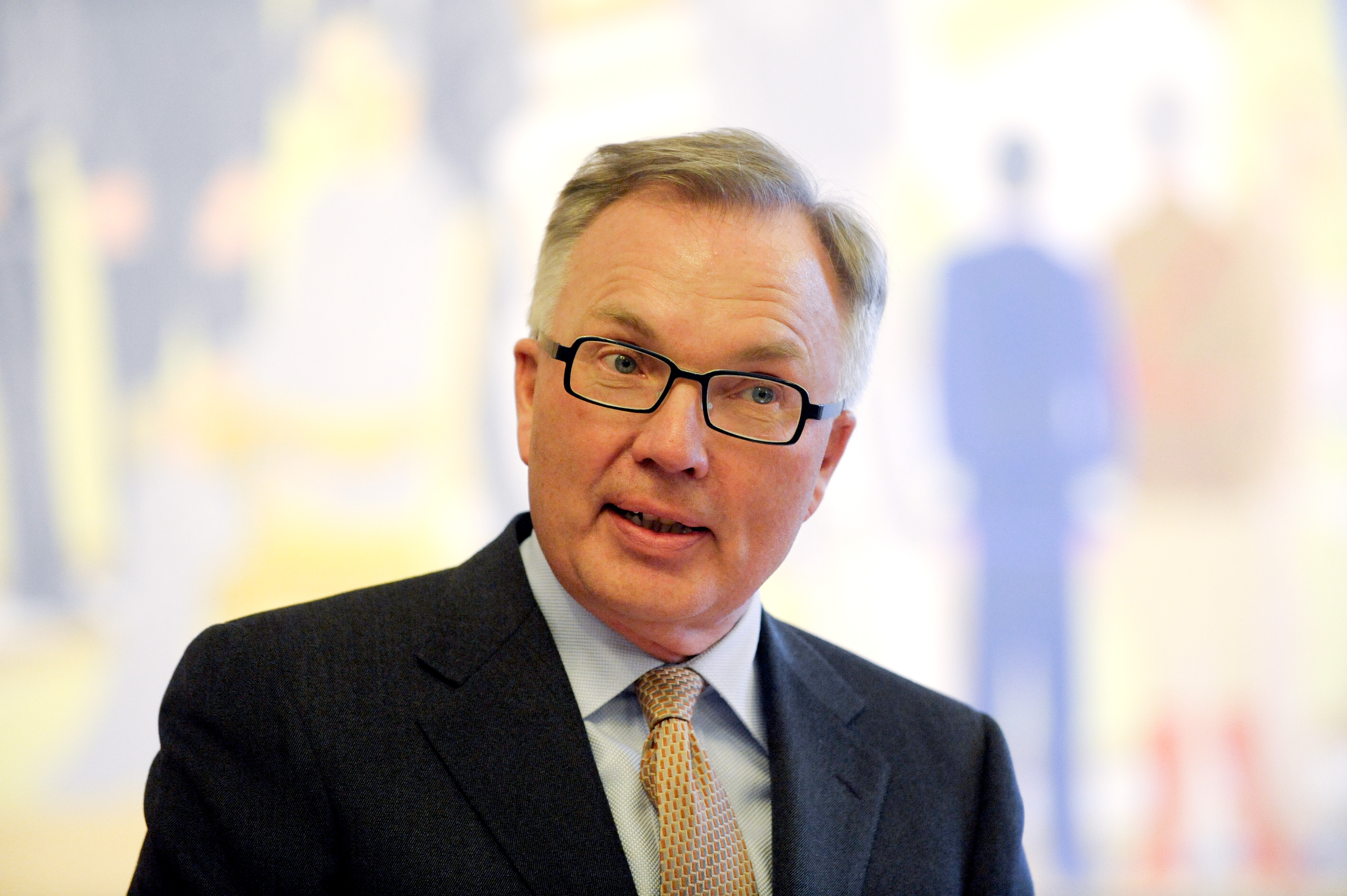 Fritz H. Schur, styrelseordförande i i SAS och Posten Norden vid lanseringen av Nordiska ministerrådets ordförandeskapsprogram